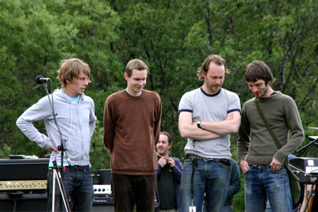 Sigur Rós al completo antes de una actuación.